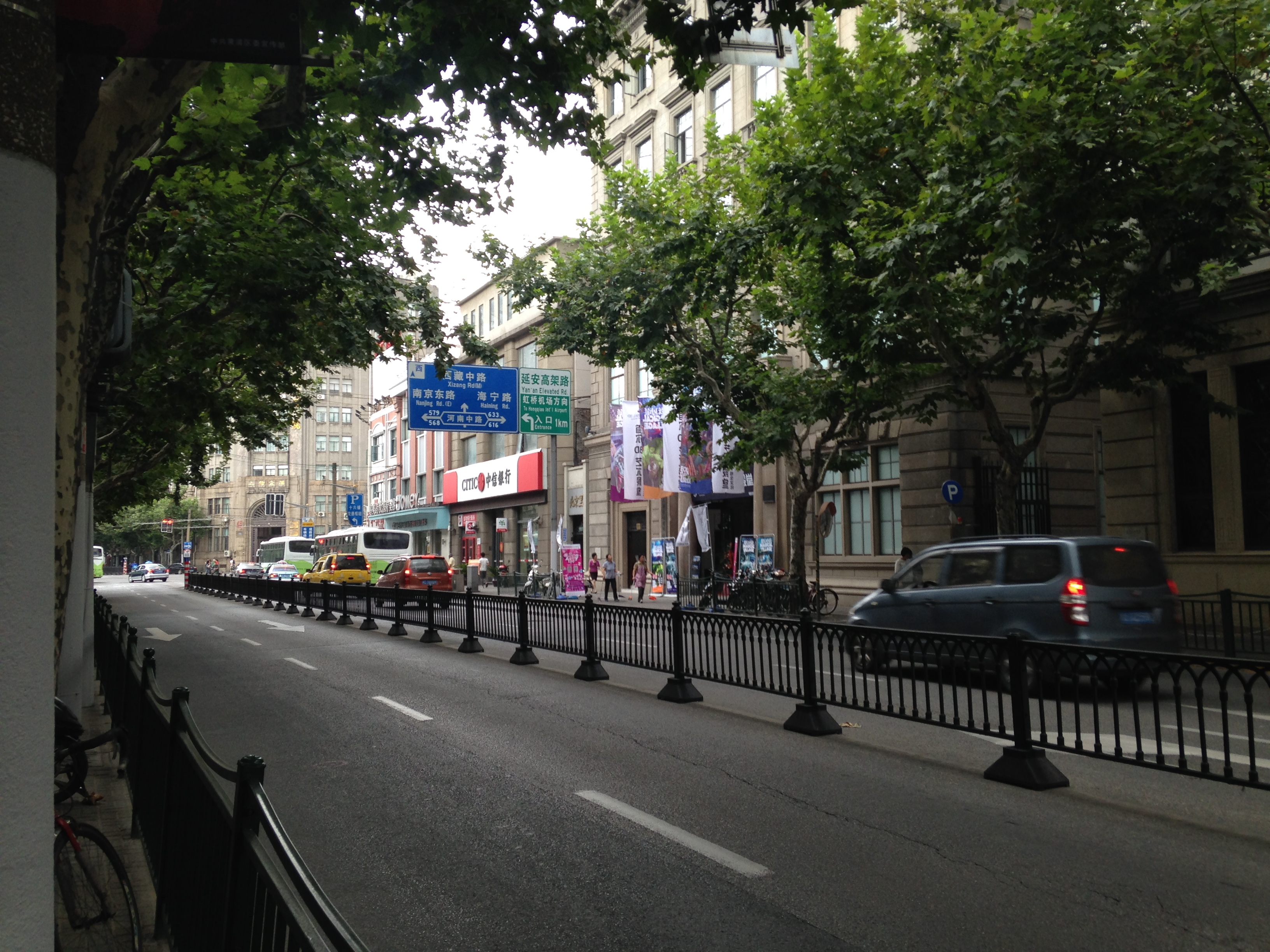 上海・北京東路